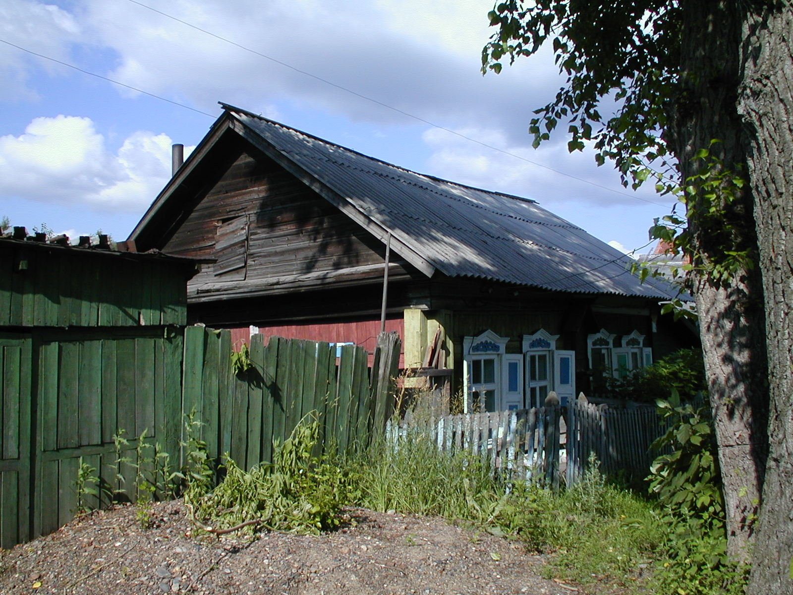 Дом, в котором жил в ссылке поэт Николай Алексеевич Клюев (Томская область, Томск, переулок Красного Пожарника, 12)